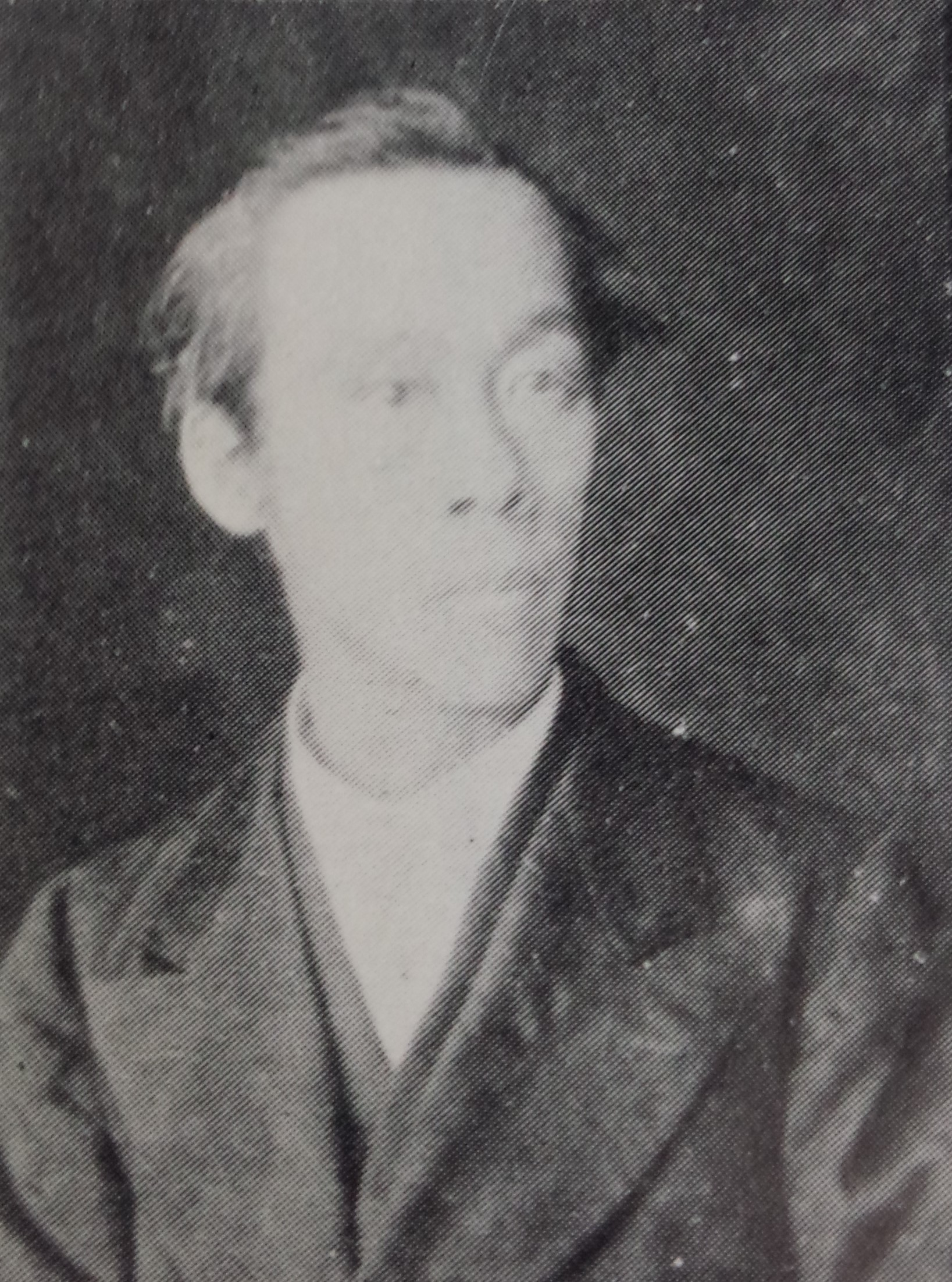 戸田氏良の肖像写真。